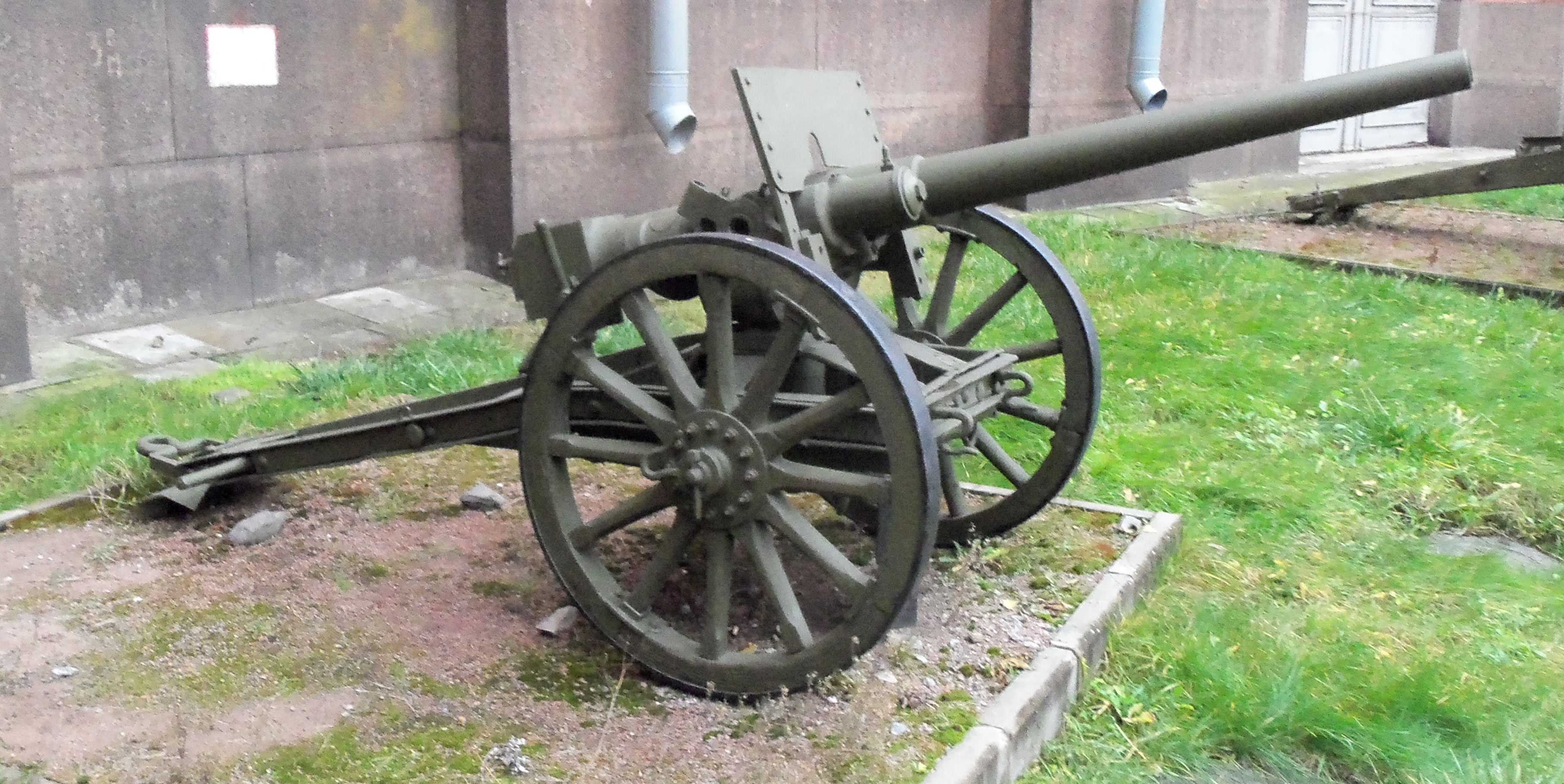 47-мм пушка системы Гочкиса на полевом лафете